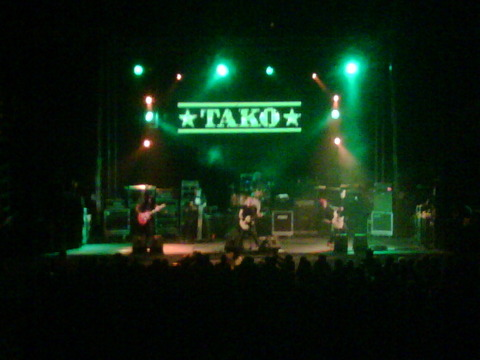 Concierto del grupo español de rock Tako el 4 de noviembre de 2011.